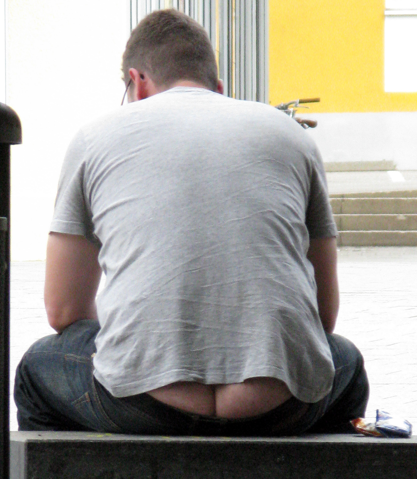 Maurerdekolleté